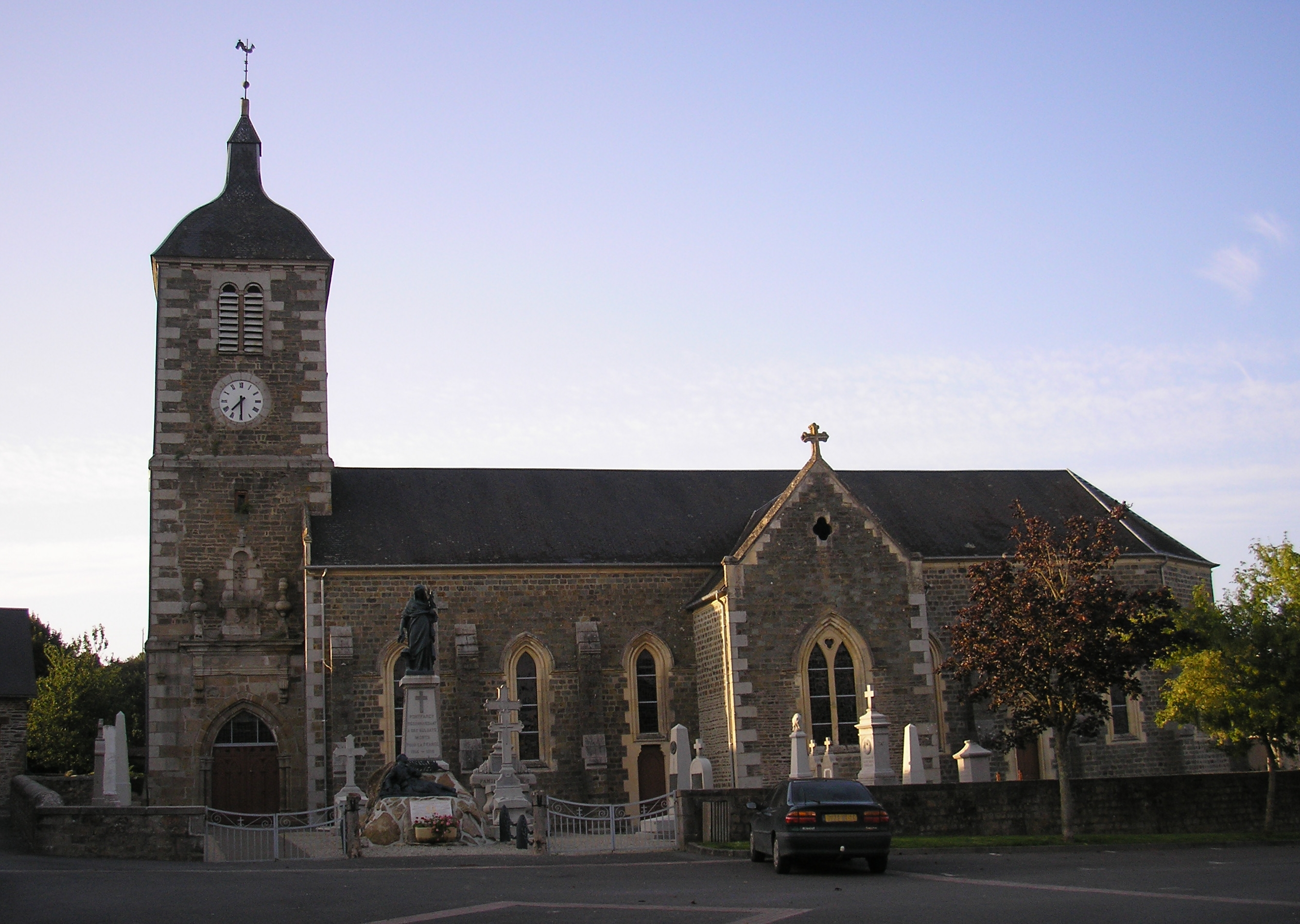 L'église de Pont-Farcy (Normandie, France).